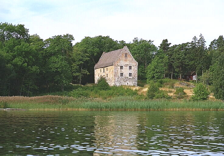 Från vattnet. Motiv: Utö hus Nyckelord: Raä-Fastigheter Kategori: Säteri Från vattnet.